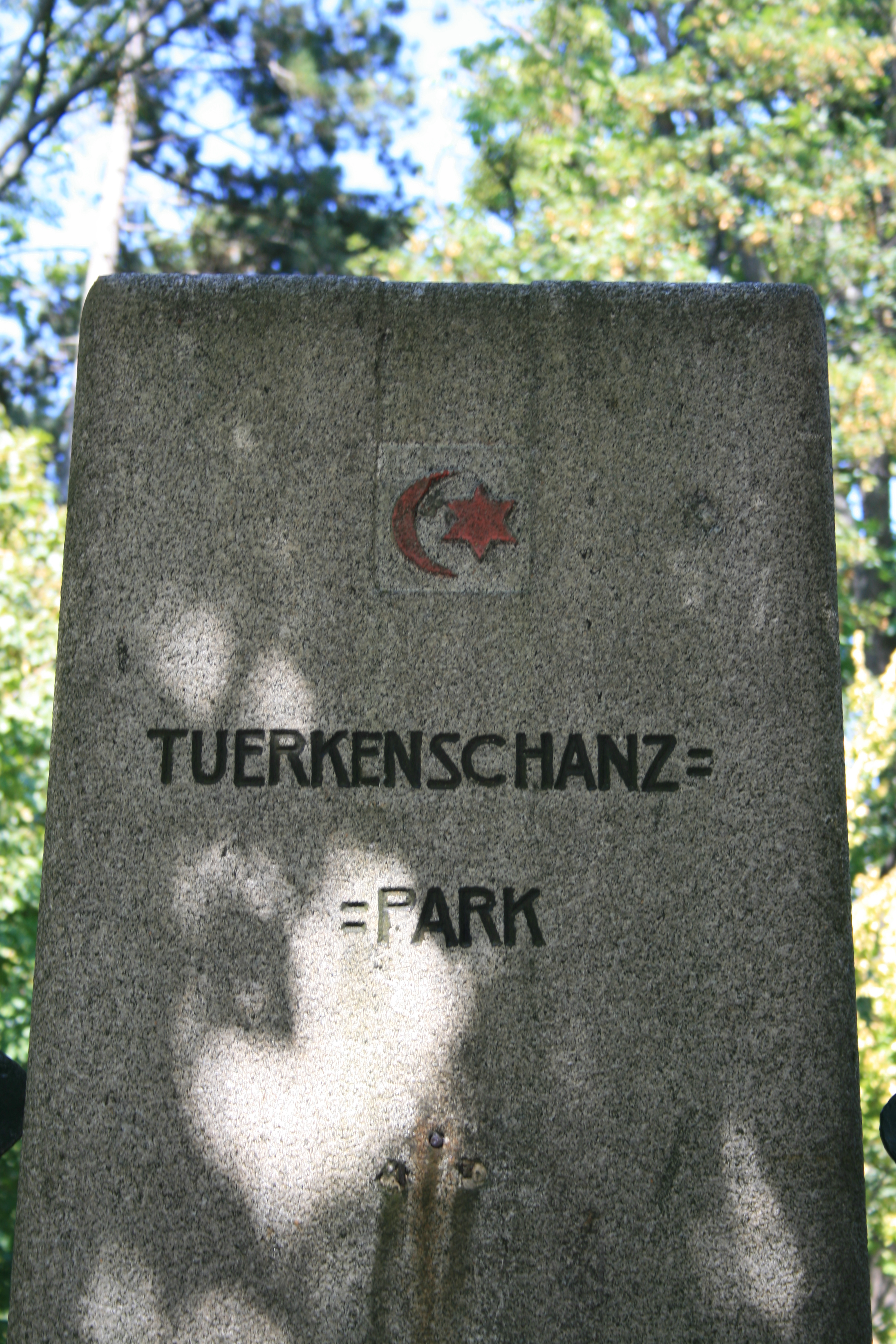 Türkenschanzpark